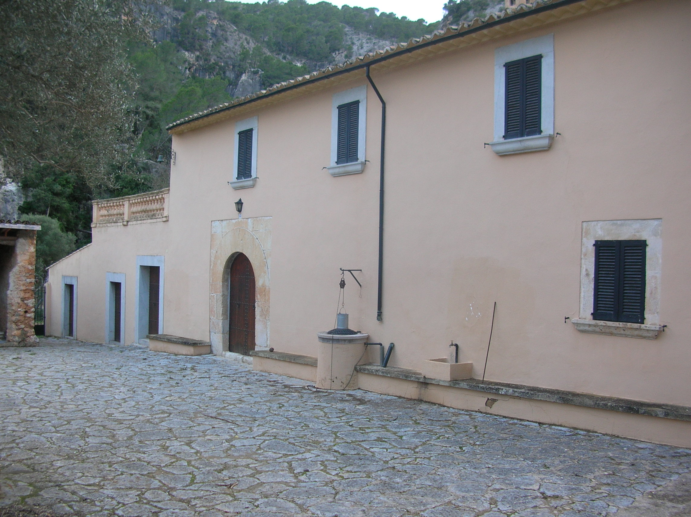 Fotografia de les cases de Son Pou